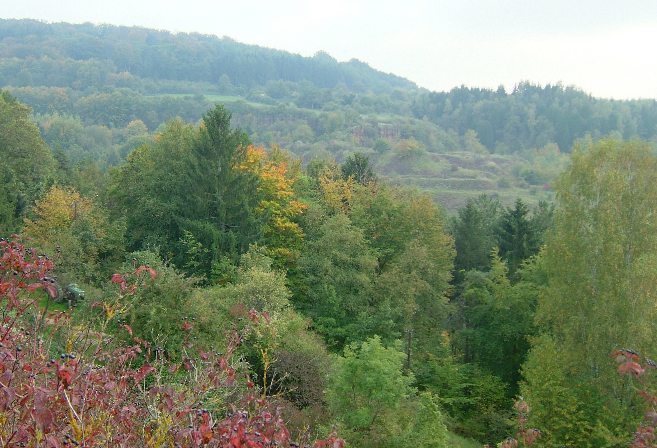 Perchesbierg